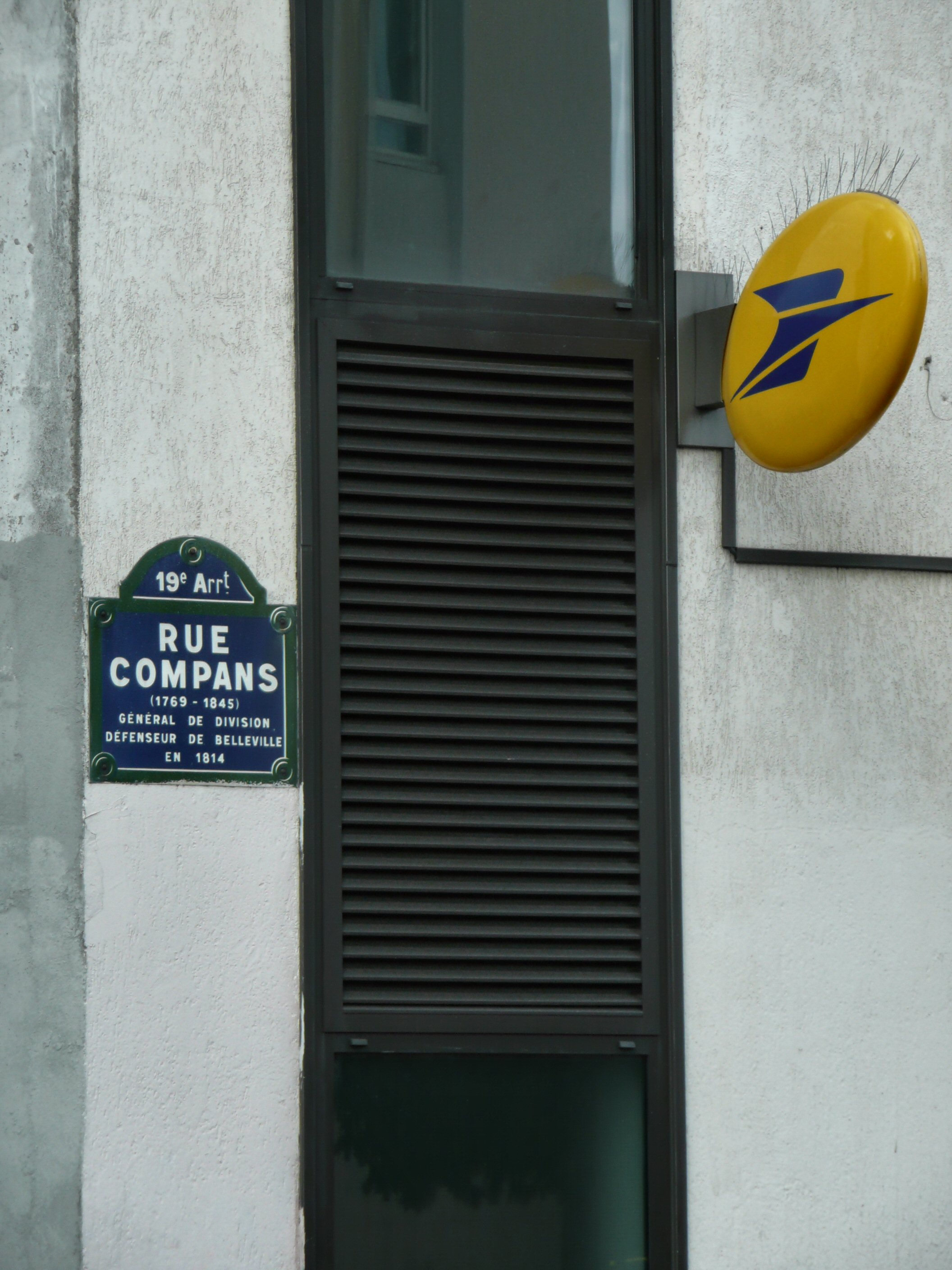 Plaque de la rue Compans, dans le 19e arrondissement de Paris, en mémoire de Jean Dominique Compans, général français (1769-1845)